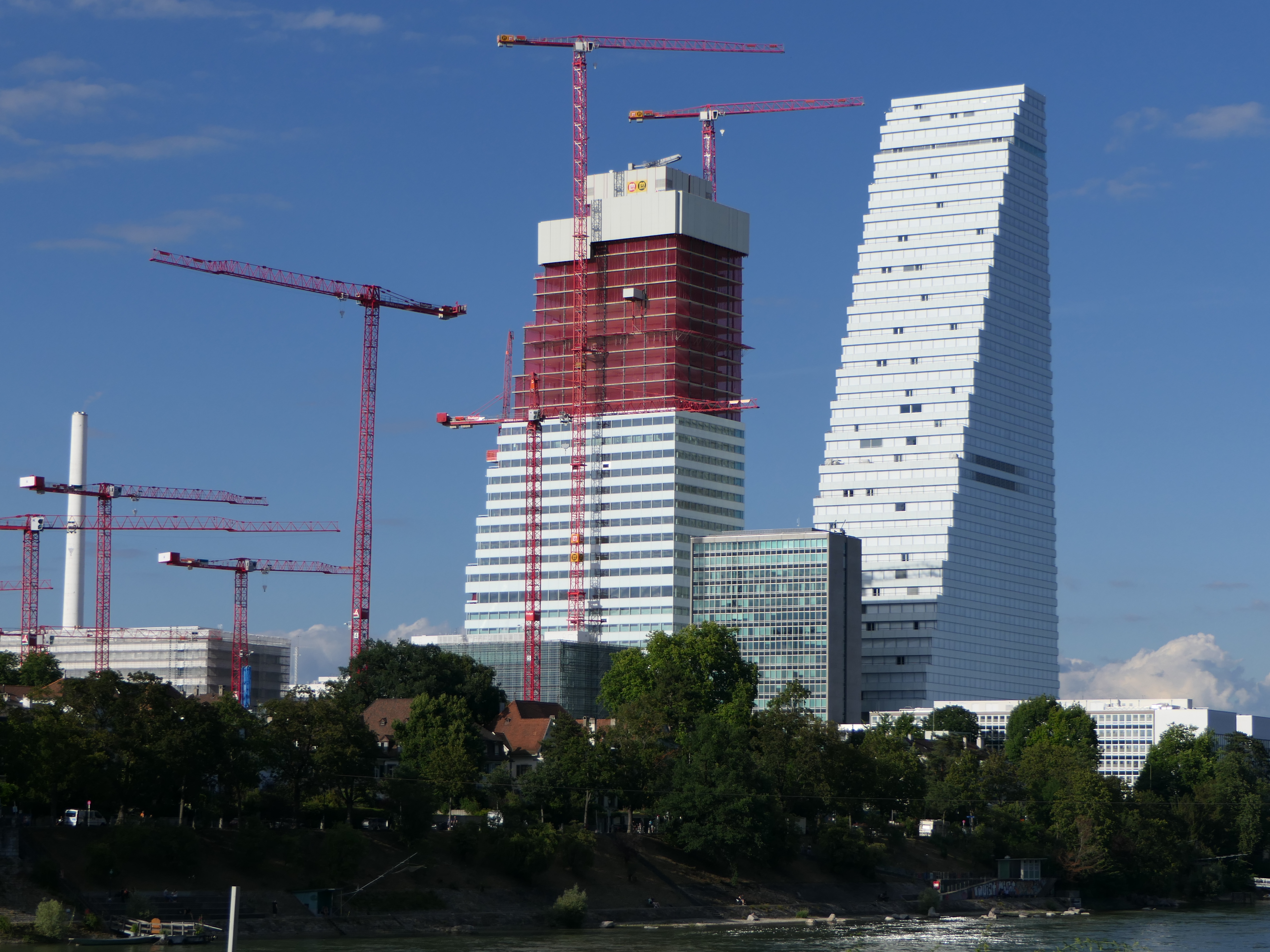 Blick von Sankt Alban auf das Areal der Firma F. Hoffmann-La Roche AG in Basel im Juni 2020. In Bildmitte der neu entstehende "Bau 2".